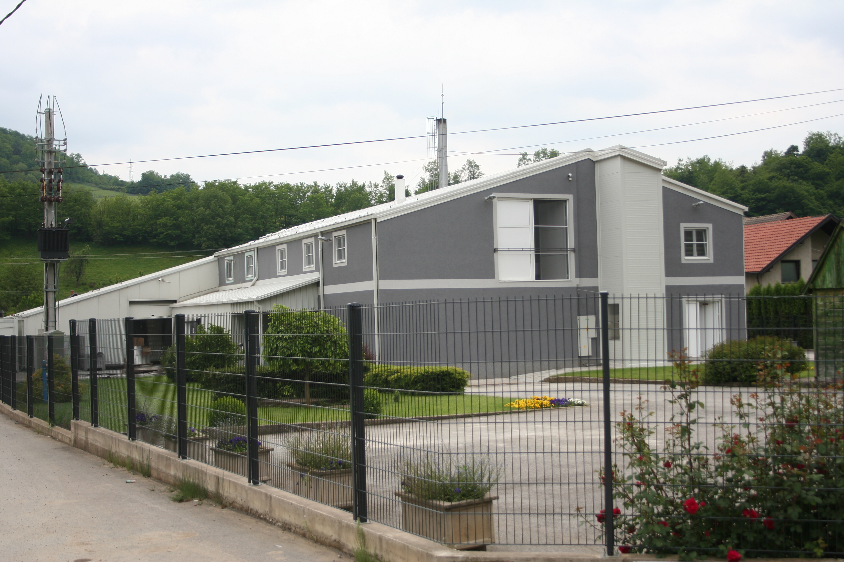 Mlekara Spasojević